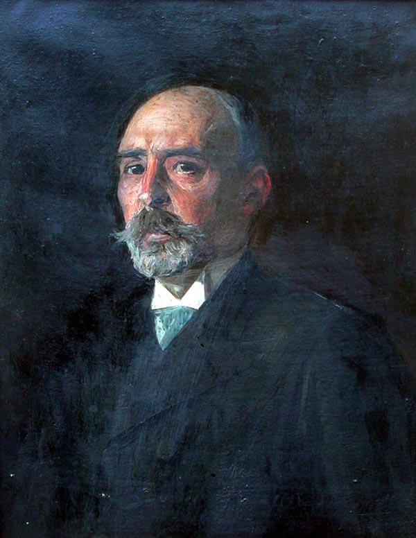 Retrato inacabado del escultor español Eduardo Barrón (1858-1911).